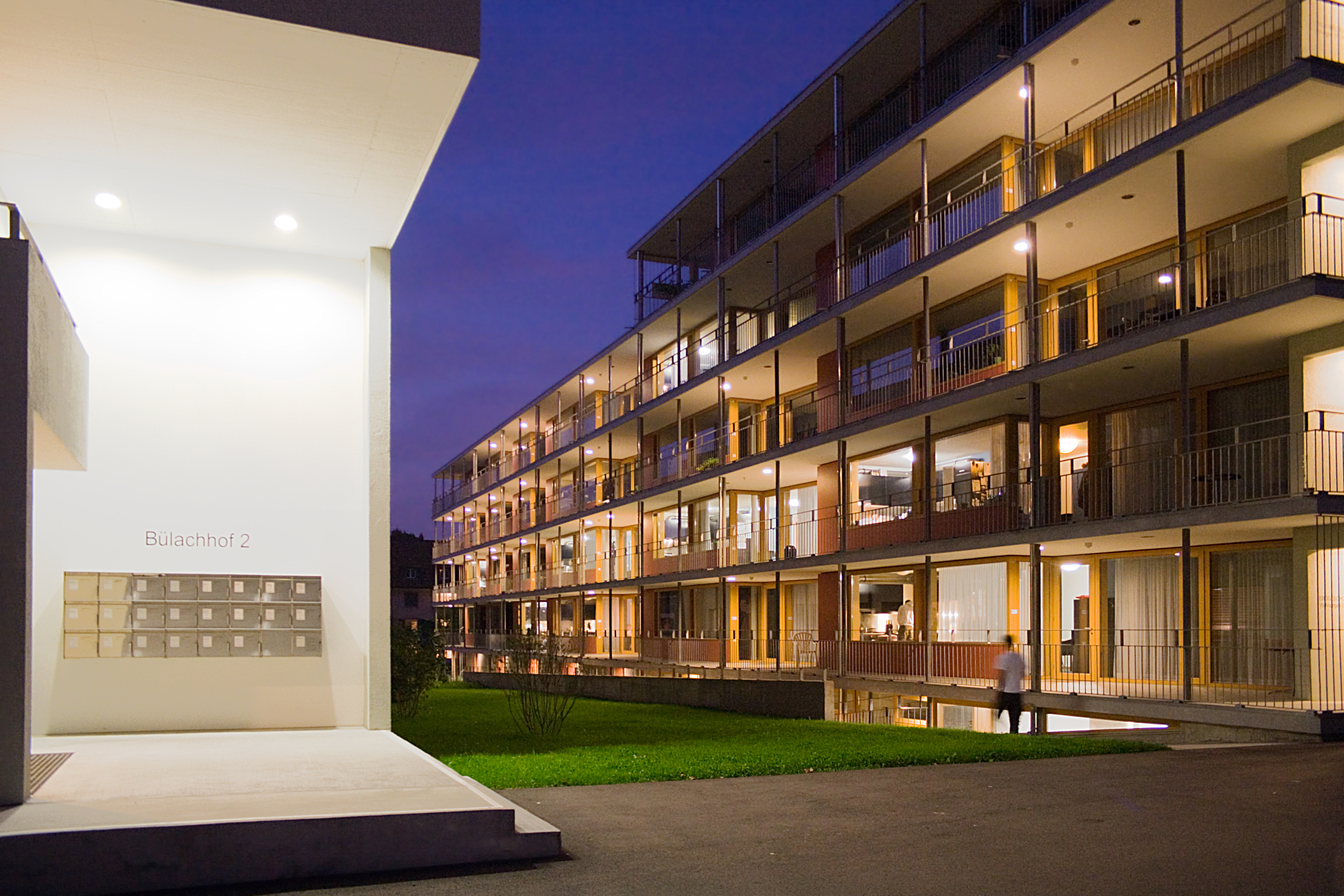 Studentensiedlung Bülachhof in Zürich, Schweiz, entworfen von Marc Langenegger; Minergie-Bau